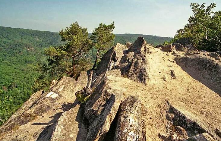 Vyhlídková skála Sealsfieldův kámen autor:Zp